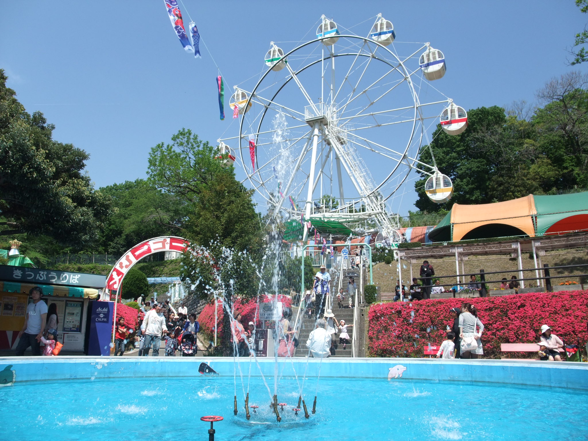 遊園地 中央噴水から見上げる観覧車